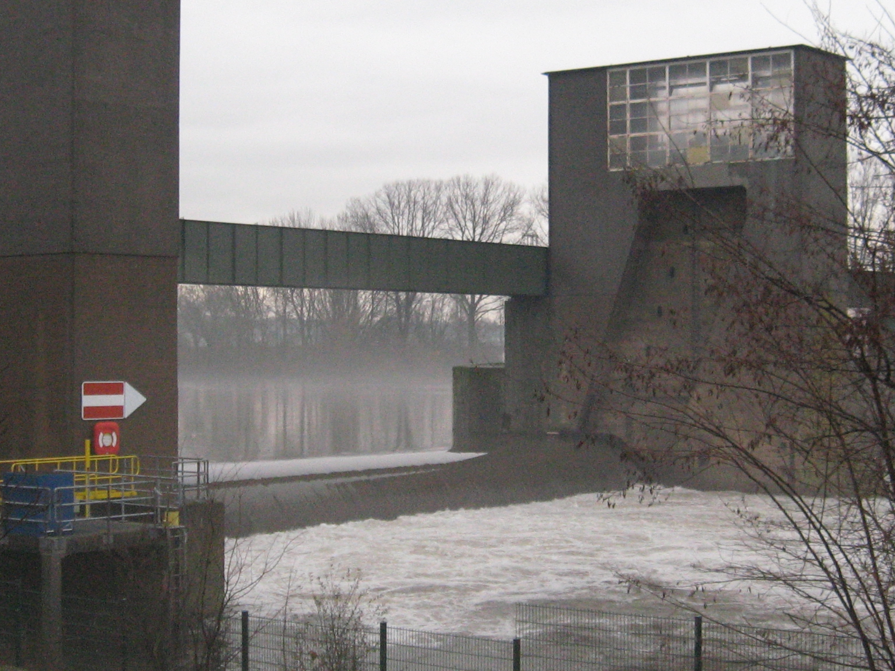 Staustufe Eddersheim 65795 Eddersheim- Hattersheim am Main, Deutschland